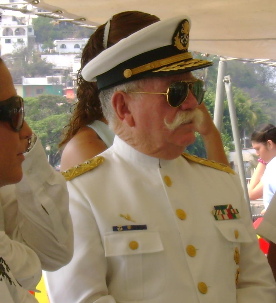 Almirante Ricardo Adolfo Fest Salmerón, durante la celebracion del Dia de la Marina.